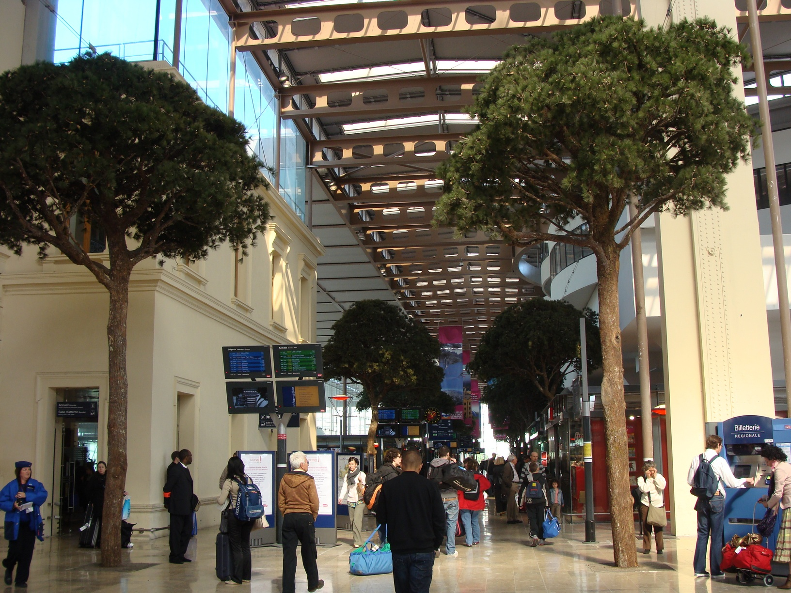 Le nouveau hall de la gare de Marseille-Saint-Charles